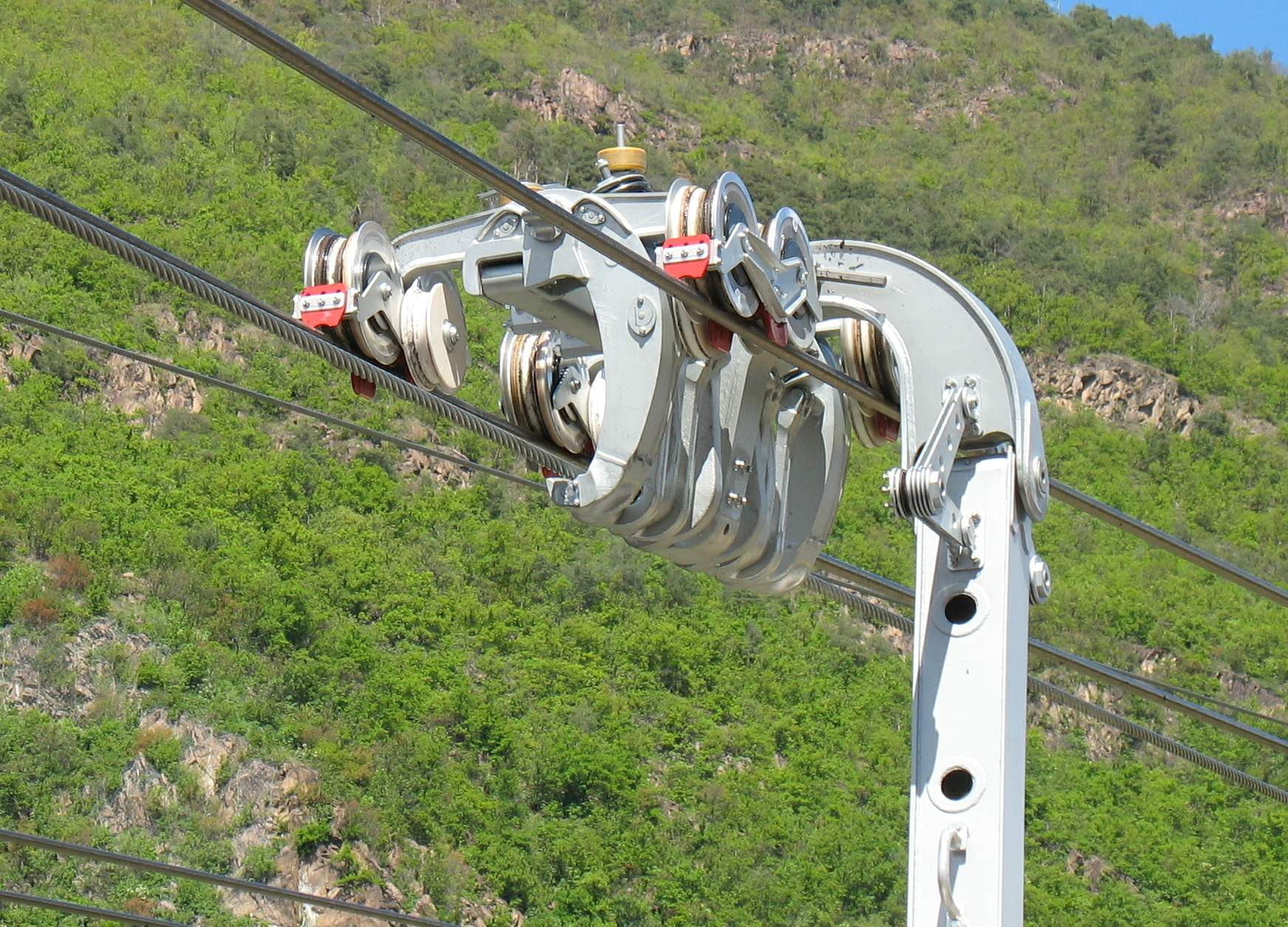 Particolare del carrello trifune Renon - 17/4/09